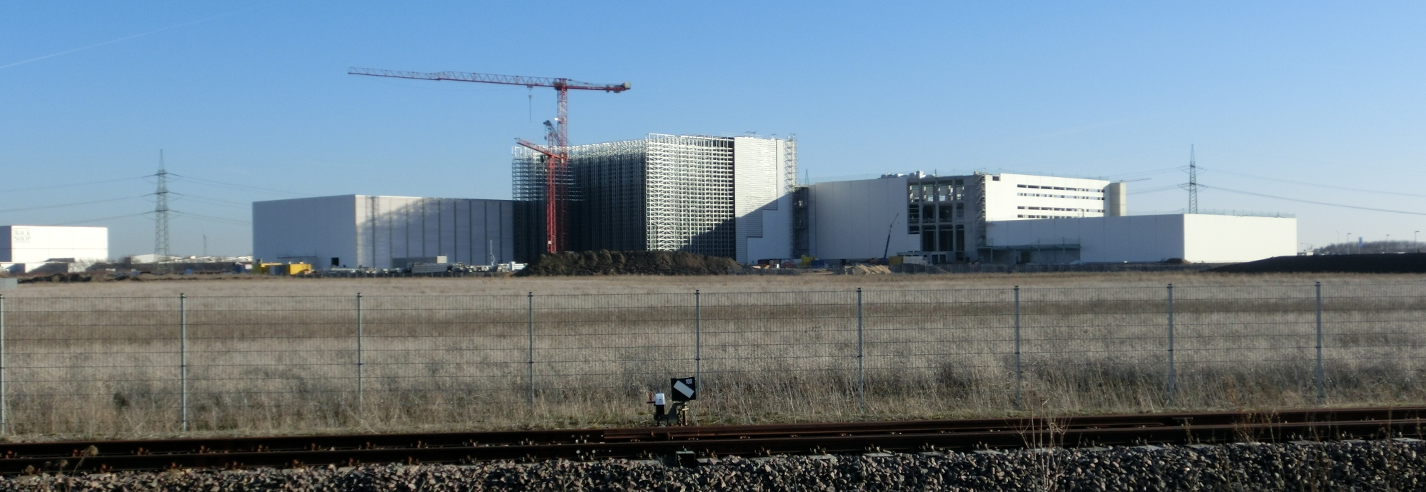 Schaeffler Baustelle im Industriegebiet Halle-Saalkreis an der A14 - Star Park in der Orionstraße in Kabelsketal-Dölbau. Ansicht von Norden.